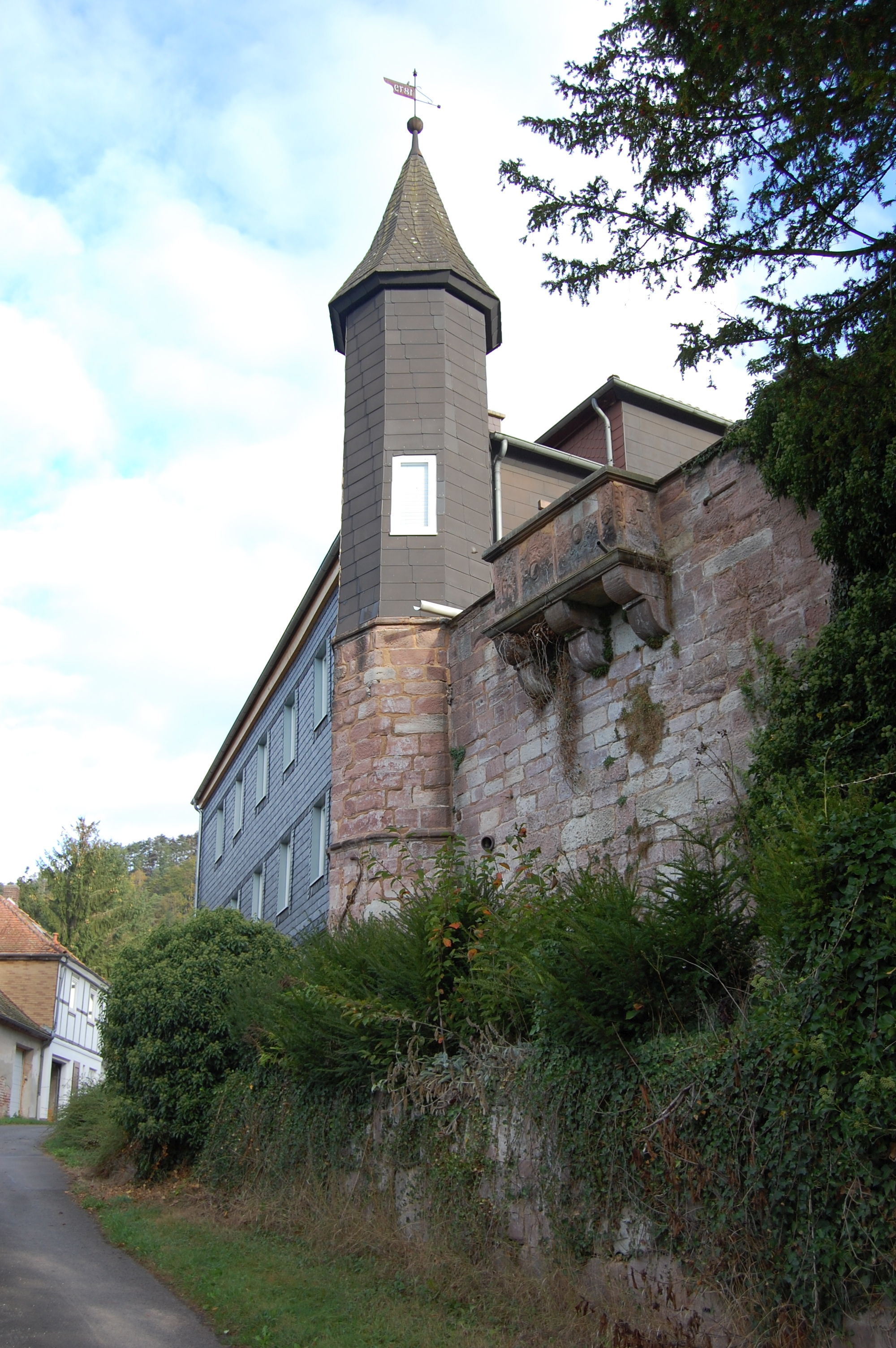 Gut Bischhausen (Stadt Witzenhausen) Herrenhaus